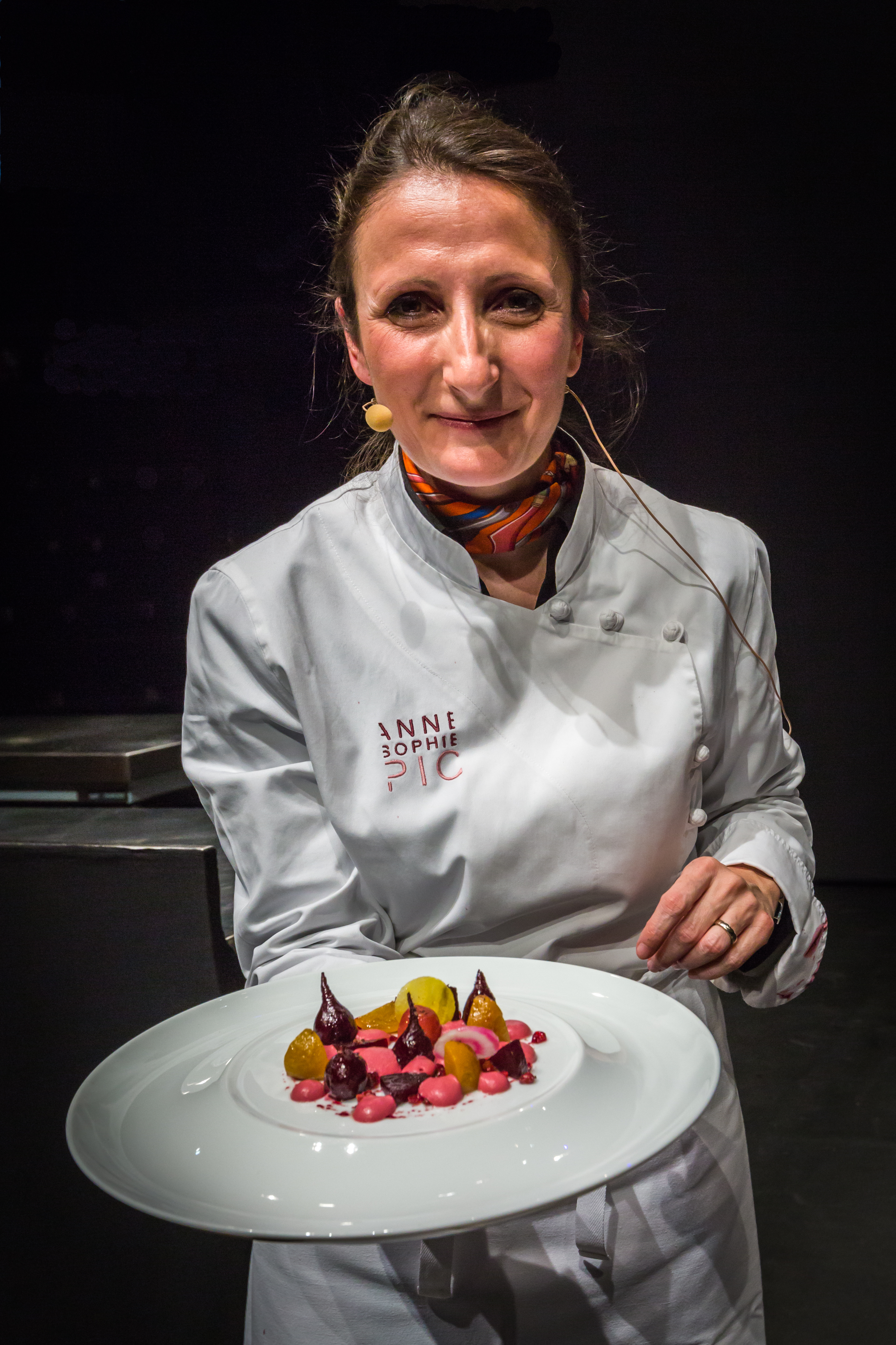 Anne-Sophie Pic, née le 12 juillet 1969 à Valence (Drôme), est un chef restaurateur de haute gastronomie et Maître Restaurateur.Elle présente ici sa « betterave plurielle, textures fondantes et crémeuses de betteraves jaunes et Chioggia au café Blue Montain acidulé d’épine-vinette » au salon Egast à Strasbourg en mars 2014.